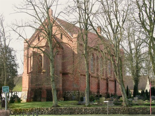 Kirche Plate, Church Plate